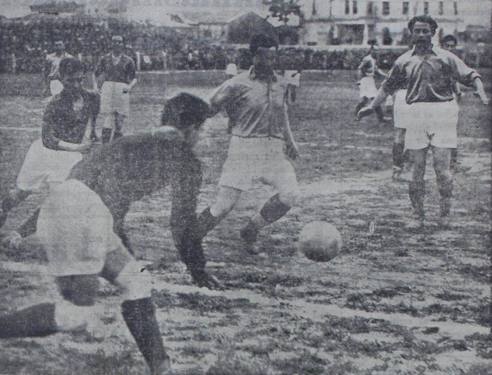 13 Mayıs 1932'deki Galatasaray-Fenerbahçe maçından bir görünüm.